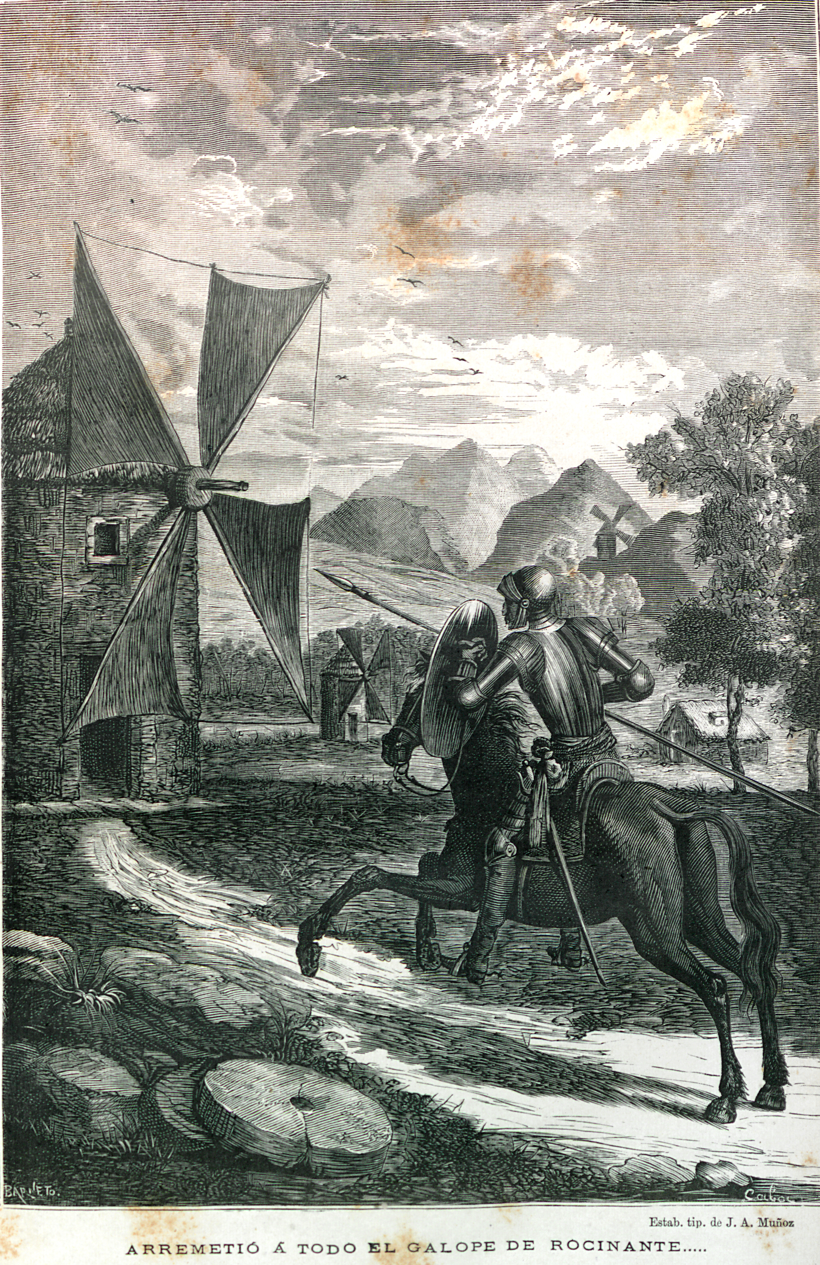 El ingenioso hidalgo Don Quijote de la Mancha / por Miguel de Cervantes Saavedra ; ilustrada con un mapa y magnificos grabados. - Nueva publicación de gran lujo. - Madrid : Biblioteca Universal Ilustrada , 1877. - [4], XL, XX [i.e. XVI], 556, 625, [3] p, 12 lam., 1 mapa ; 32cm.